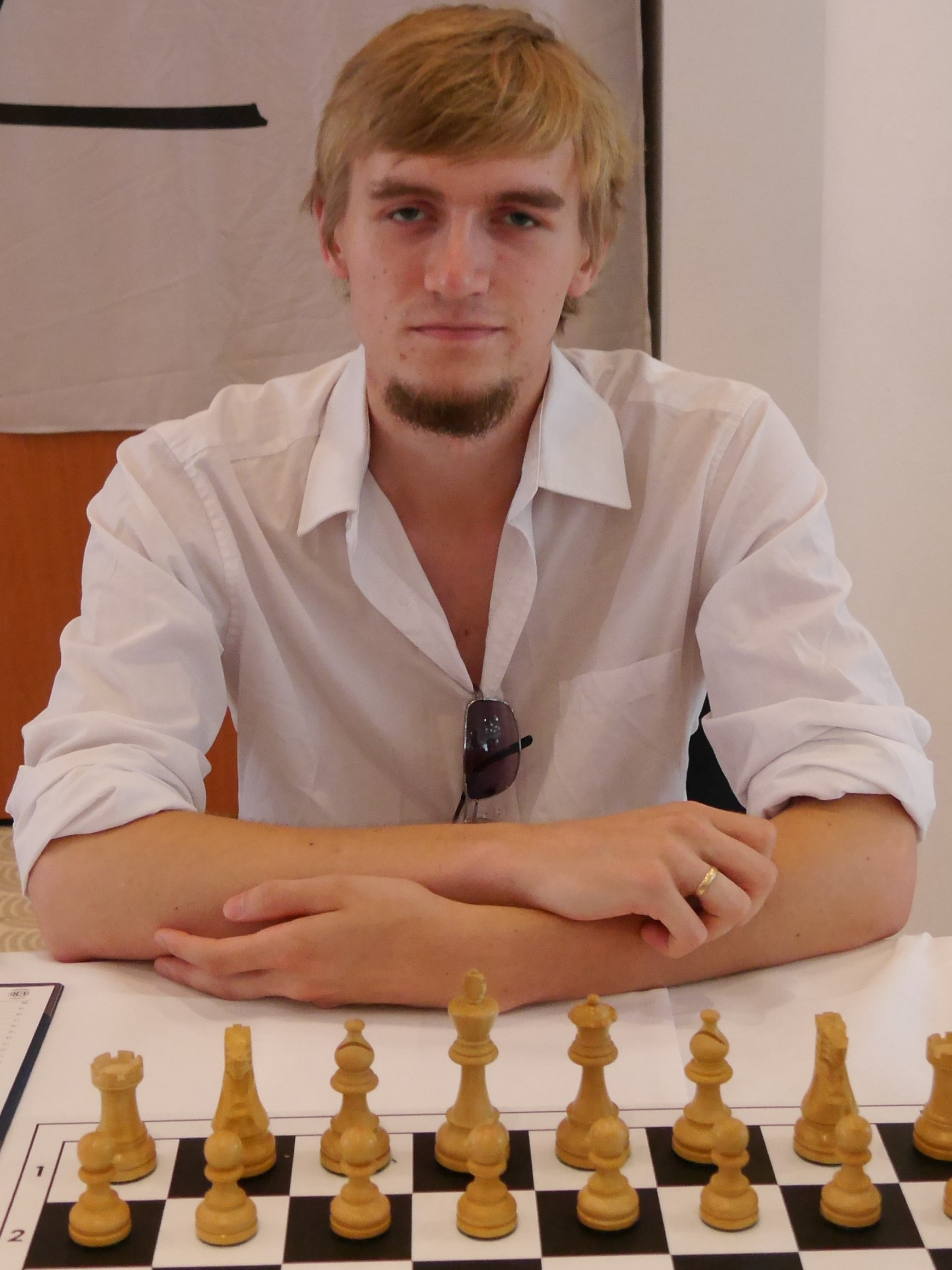 Toms Kantans, ZMDI Schachfestival 2016 in Dresden.